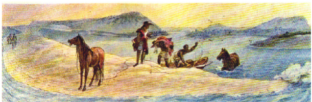 um dos primeiros registros visuais de Torres: a passagem do Mampituba